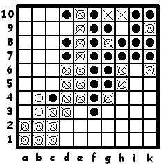 Пример "Крепости" в игре "Война вирусов"